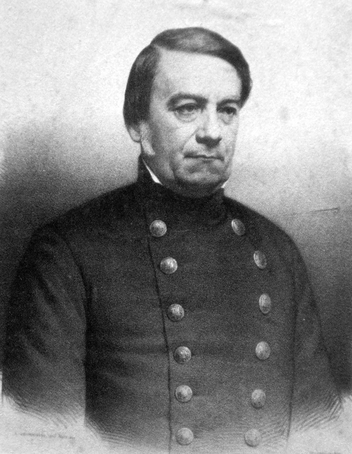 José María Paz. Litoghrafía de E. Desmaisons, Paris